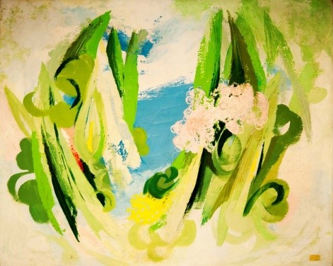 A TAVASZ (80x100 cm, olaj, vászon) A sarjadás, a feltörekvő növényi formák virágzása, újulása, az ég kékjének frissessége, derűje az újjáéledést hordozza. Színei a friss zöldek, sárga, fehér, a kék és a gyümölcsfák rózsaszíne – dinamikus mozgó összhatásban.